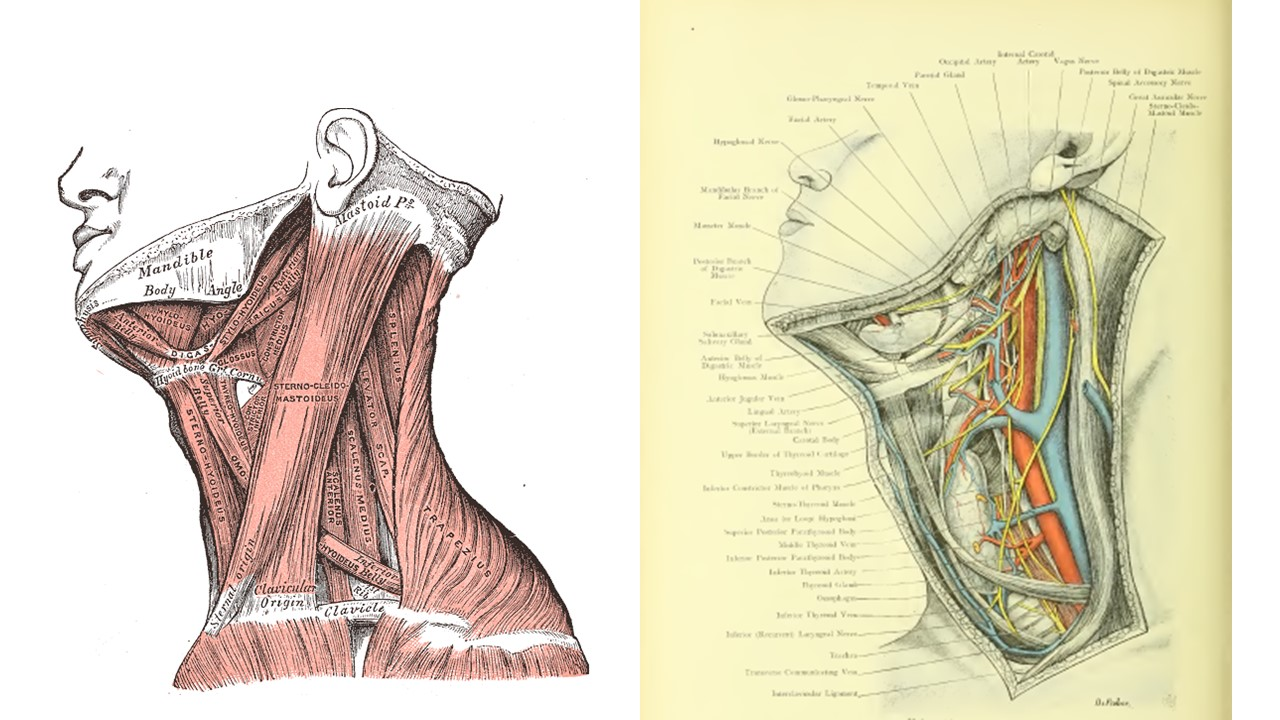 Anatomia del collo. Muscoli, nervi e vasi